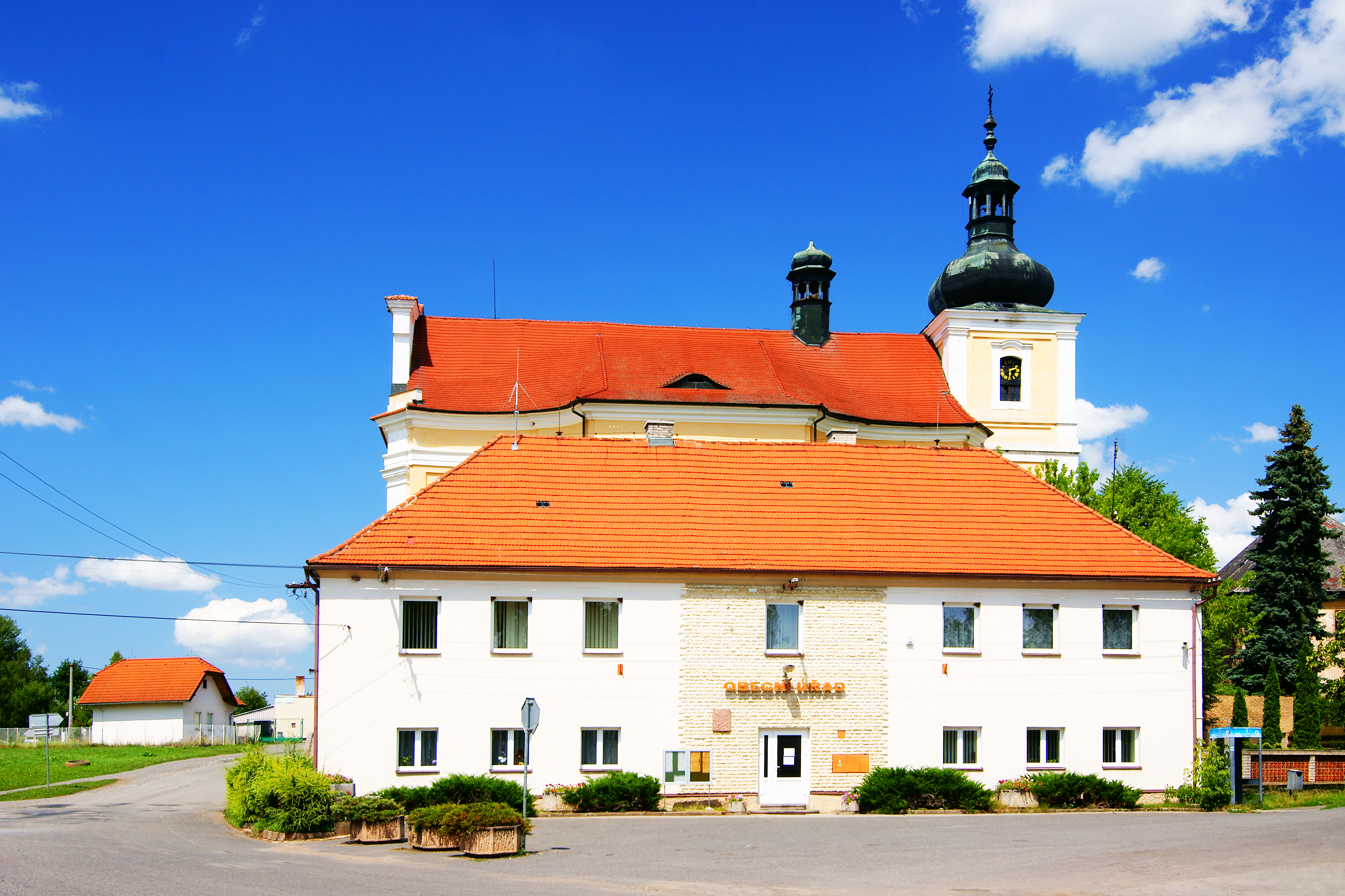 Obecní úřad a barokní kostel svatého Václava v Žihli.